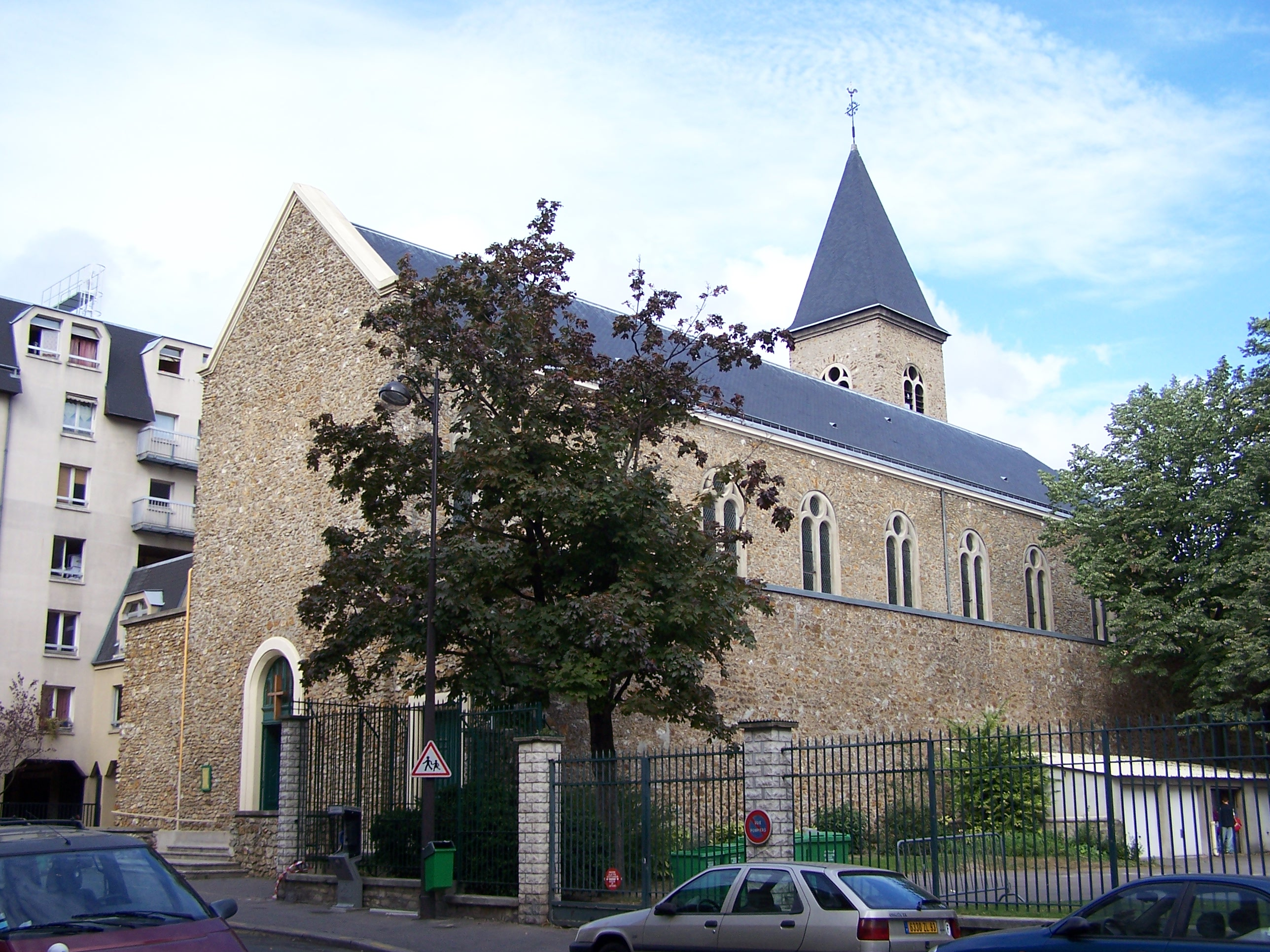 Église Ste Genviève-des-Carrières à Paris XVIIIe (France)